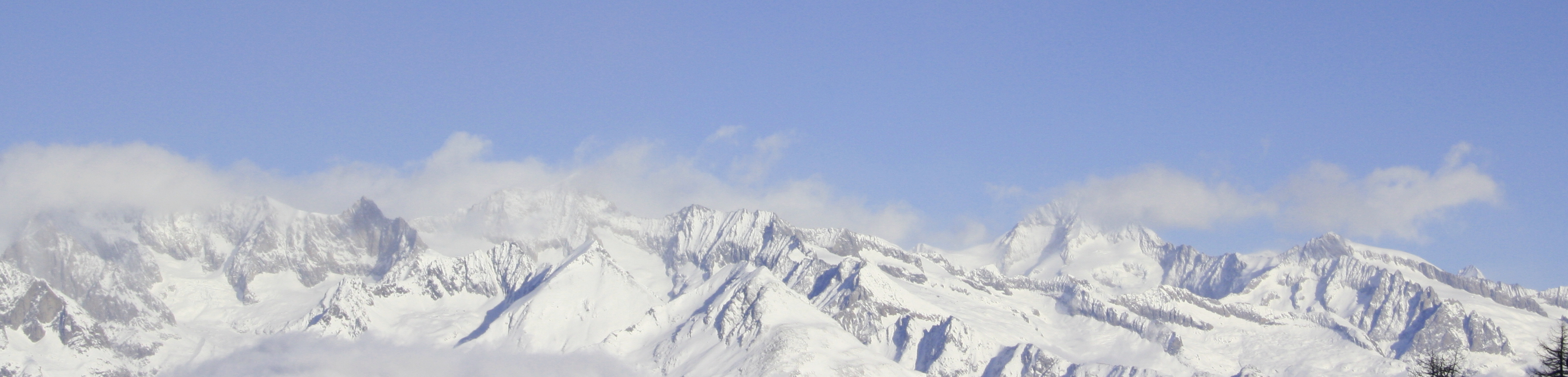 View from the hills over graechen (grächen), switzerland